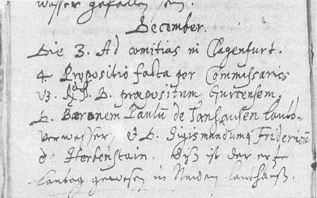 Notiz aus dem Extractus des Gurker Dompropstes und Weihbischofs Karl von Griming: Erwähnung des ersten Landtages im neuen Klagenfurter Landhaus am 4. 12. 1581